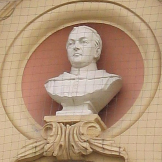 Büste des Theologen Ignaz Gropp (1695-1758) an der Front (2. OG) des Hauses Marktplatz 18 in Bad Kissingen. Das Geburtshaus wurde 1897 durch einen Neubau in historisierendem flämischem Barock ersetzt. Die Büste wurde 1897 vom Bad Kissinger Bildhauer Valentin Weidner geschaffen